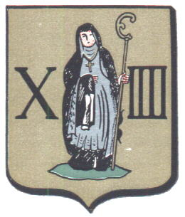 Wapen van de gemeente Wetteren.